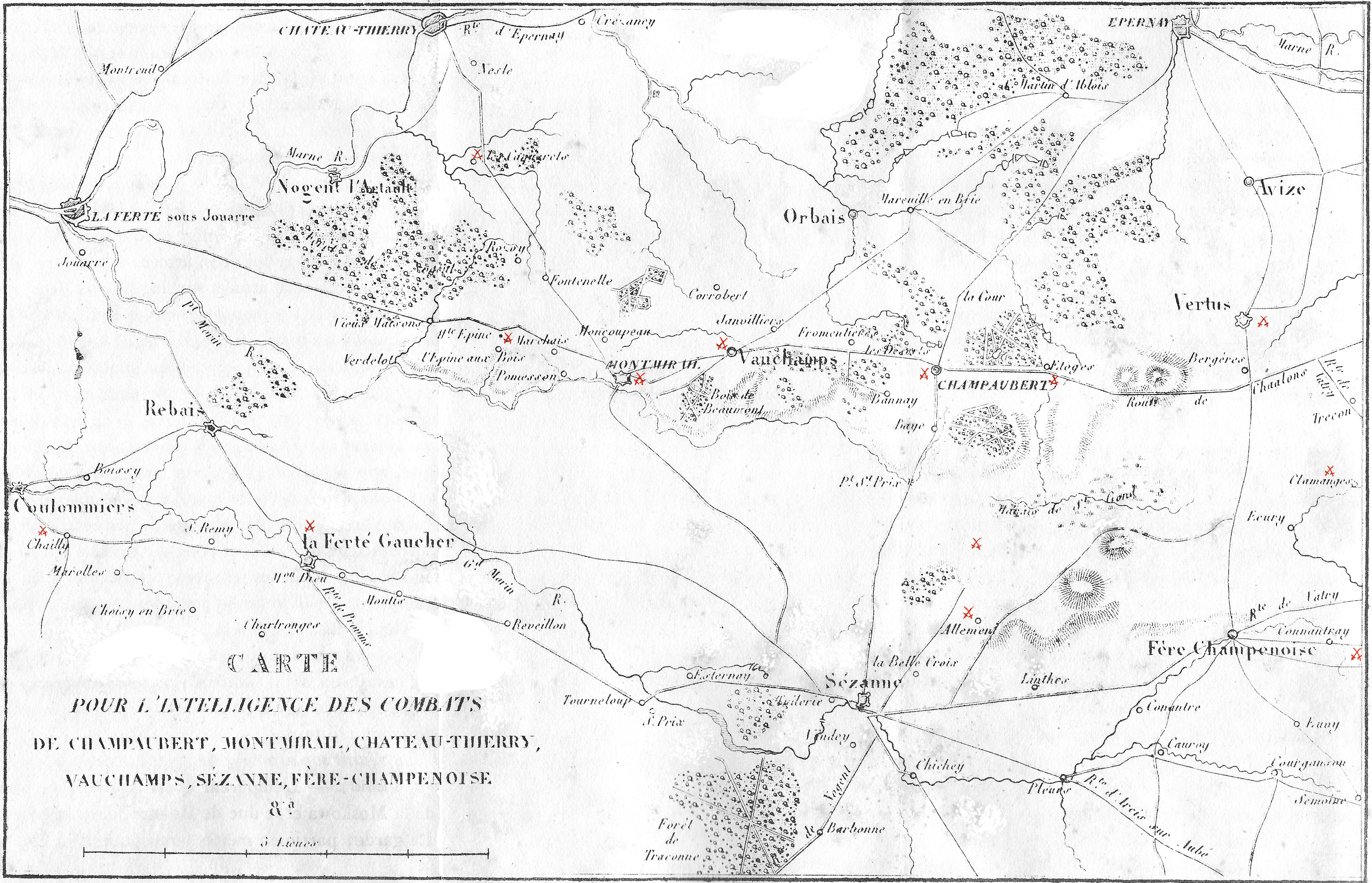 Tome 12 carte N°100 : les batailles de FERE CHAMPENOISE, Champaubert et Chateau-Thierry.